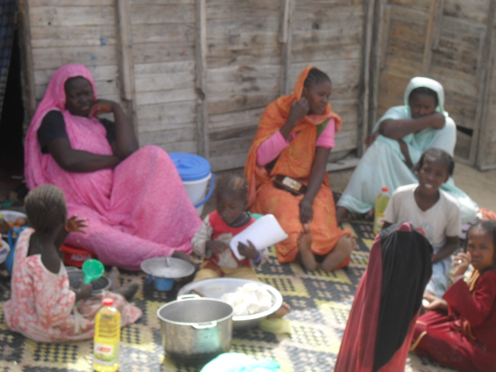 [Jemal Oumar] Former slaves face economic hardship, often with continuing financial dependence on their previous masters. يواجه العبيد السابقون صعوبات اقتصادية تتجلى بشكل خاص في استمرار اعتمادهم المالي على أسيادهم السابقين Les anciens esclaves connaissent des situations économiques difficiles, souvent liées à une dépendance financière envers leurs anciens maîtres.